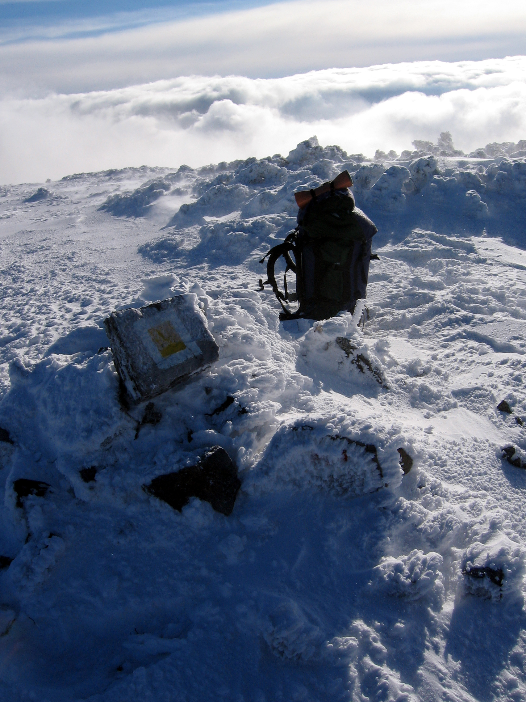 З'єднувальний маршрут с. Осмолода ― г. Молода